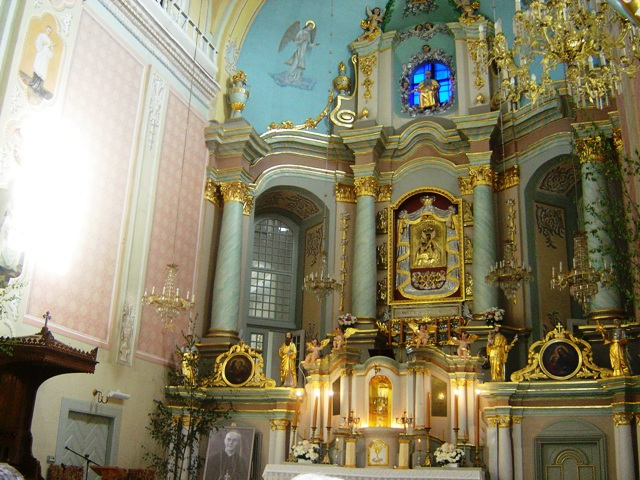 Ołtarz główny Bazyliki z cudownym obrazem M.B.Aglońskiej. Wymiary Bazyliki: 45 m długości, 23 m szerokości, wieże wysokości 56 m.